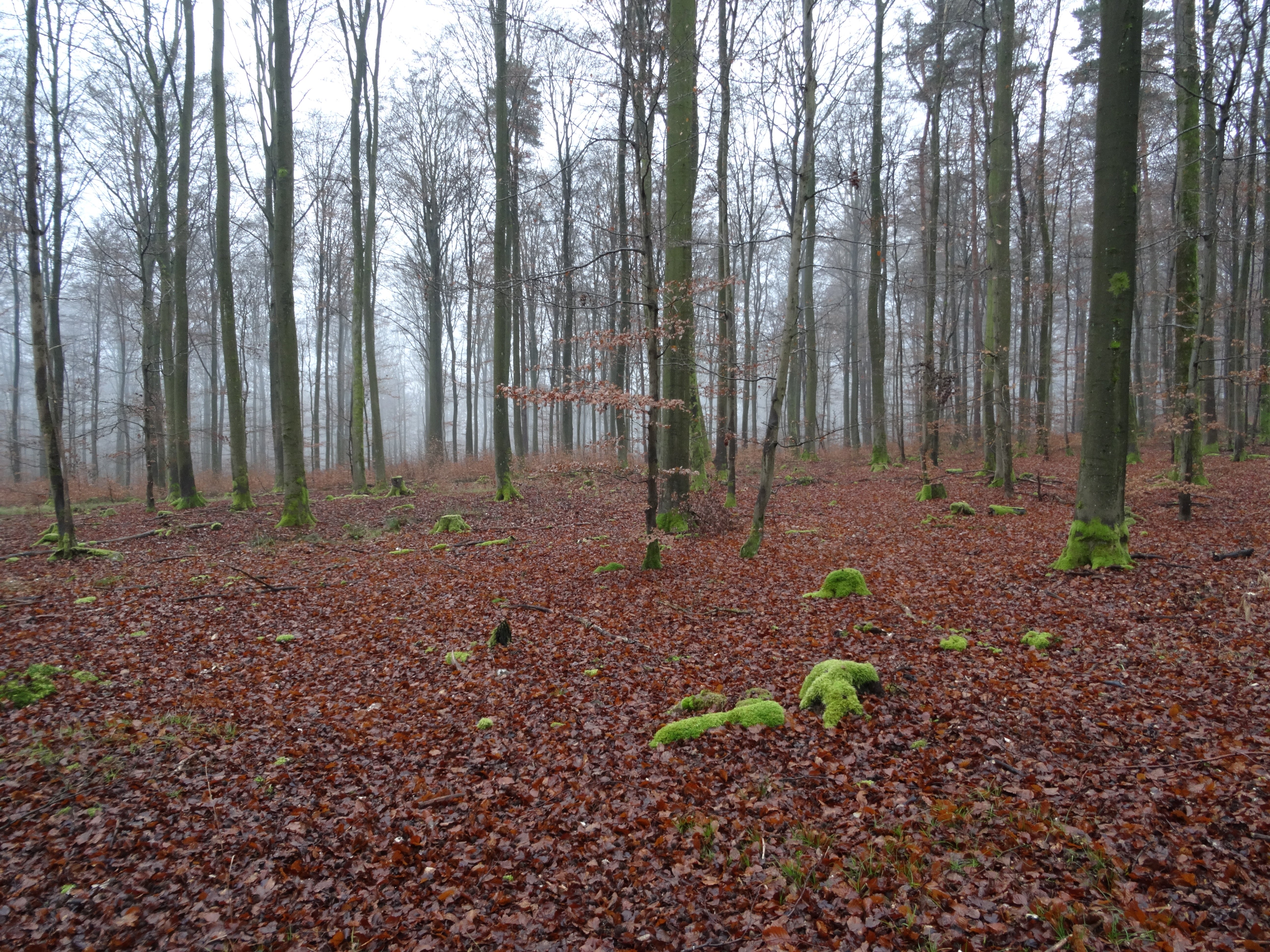 Mischwald aus Rotbuchen und Kiefern im Forst Aura nahe Burgsinn, Naturpark Spessart, Bayern